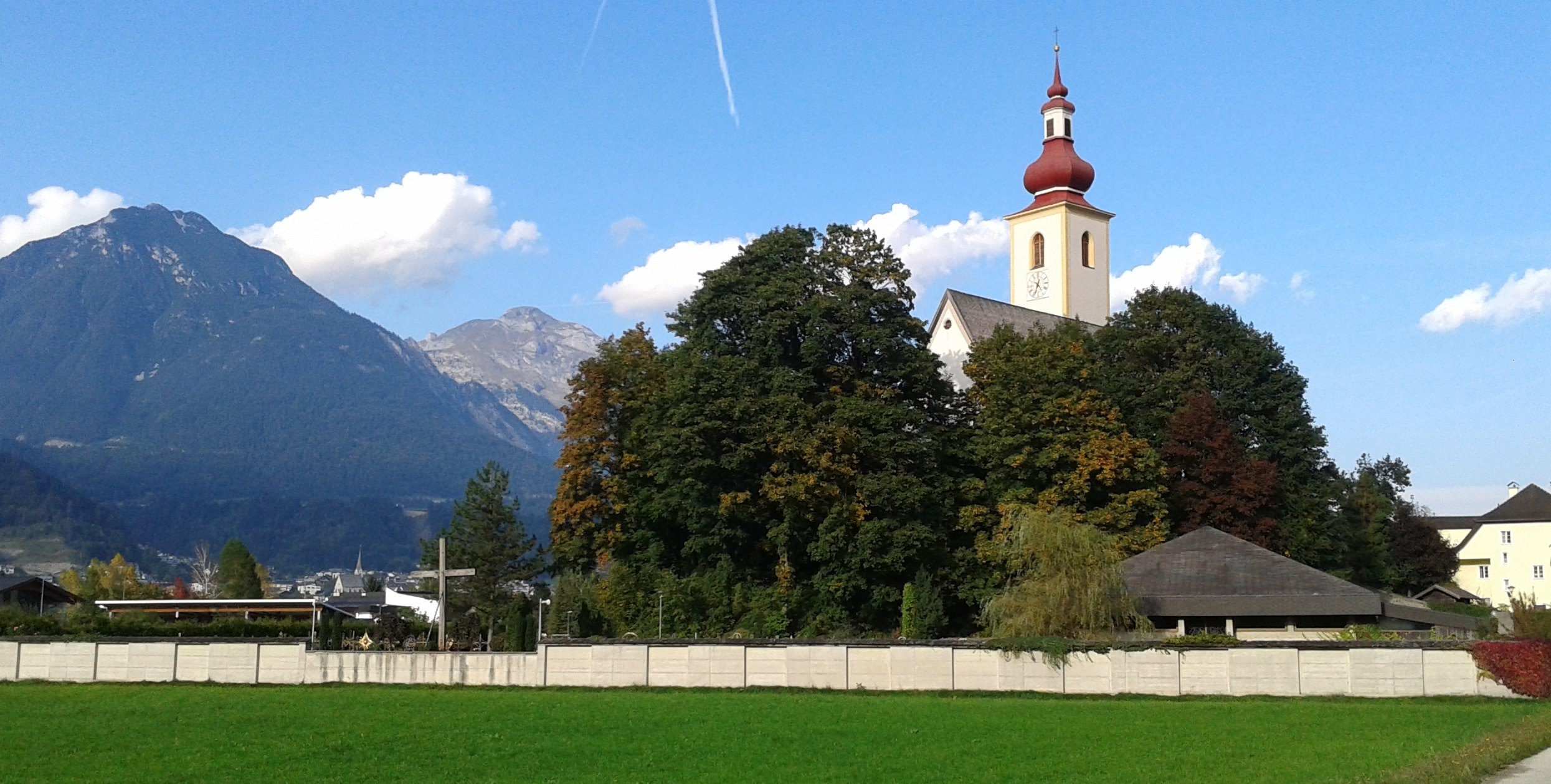 Pfarrkirche Hl. Margareta in St. Margarethen (Gem. Buch in Tirol) von Westen